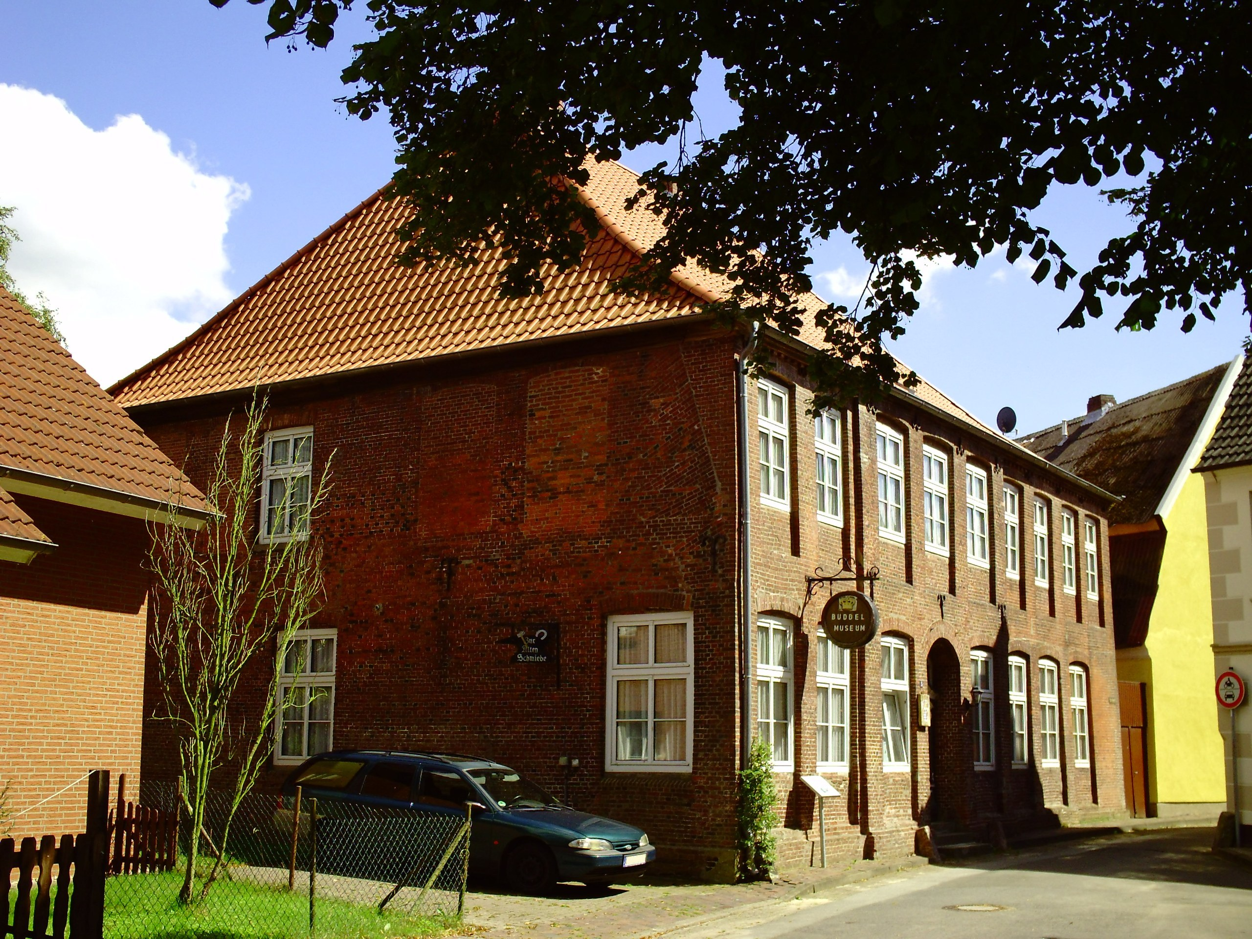 Das Buddelmuseum in Osten, Landkreis Cuxhaven